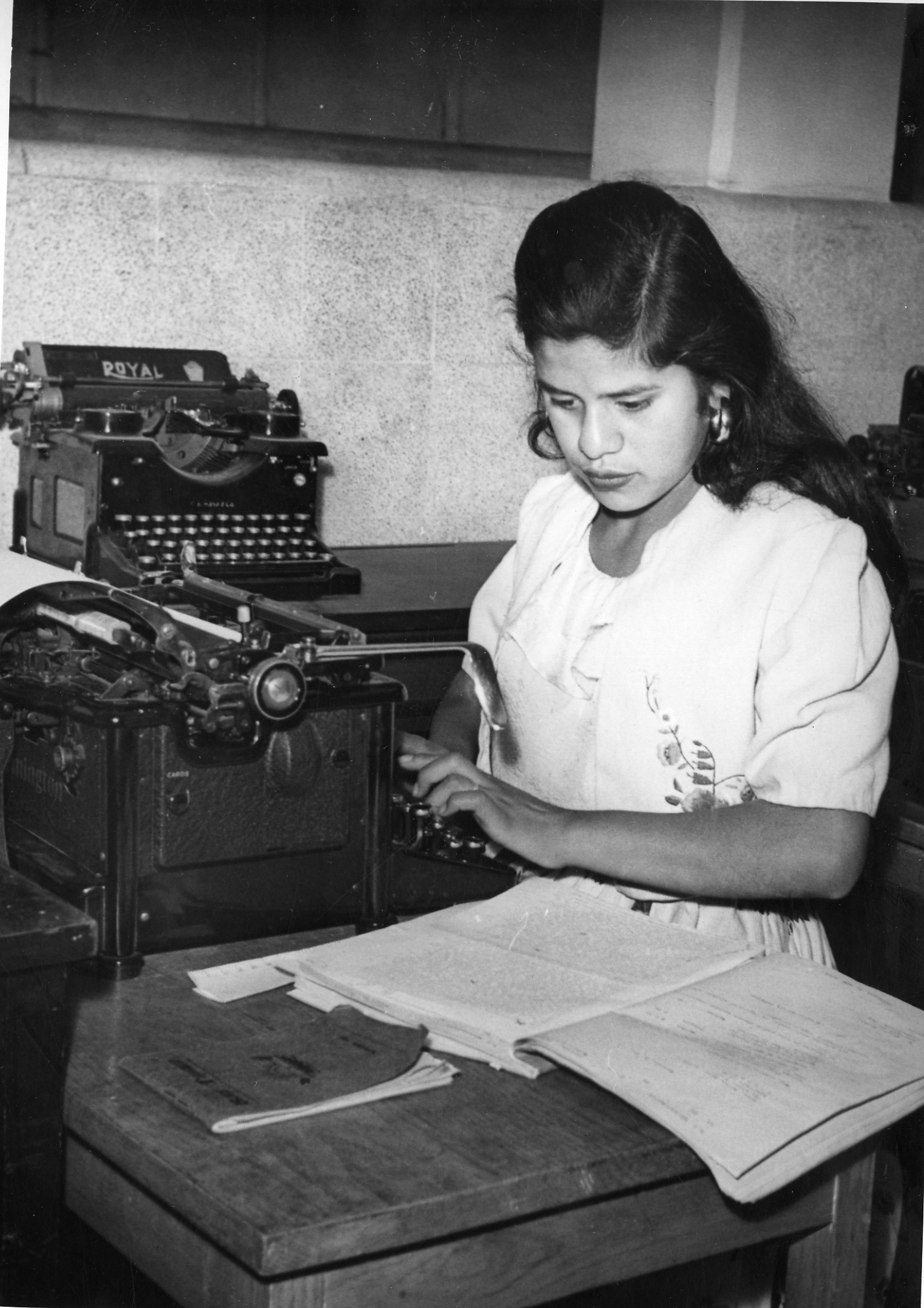 Fotografía antigua de la Ciudad de México resguardadas por el Museo Archivo de la Fotografía (MAF) de la Ciudad de México.